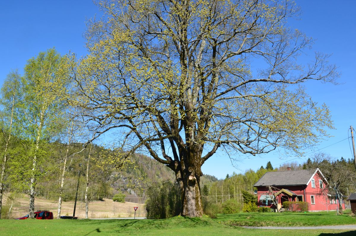 Løvealmen står vest for Lågen i Hedrum.